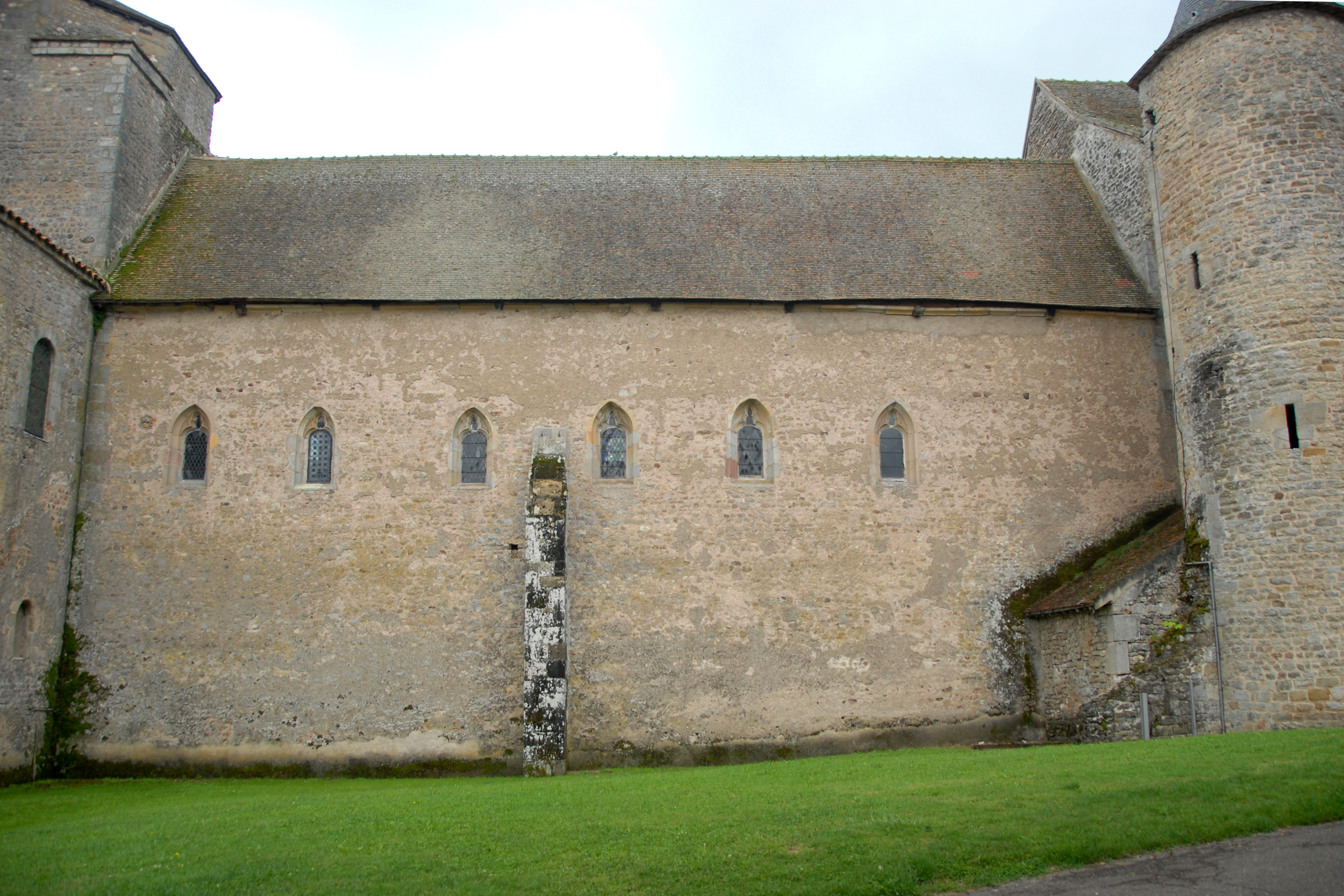 Abteikirche, Langhaus von NW